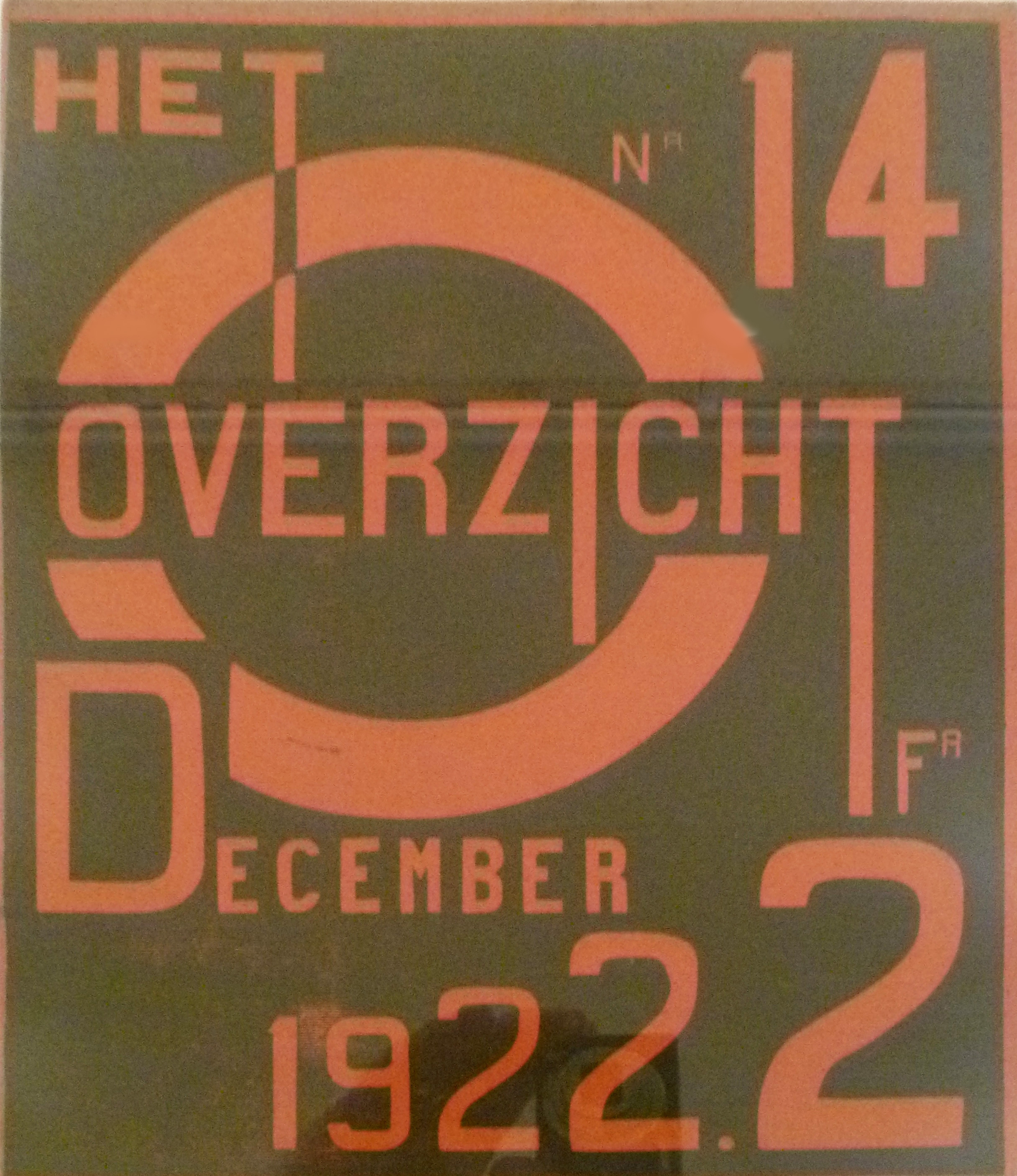 Het Overzicht n° 14 - december 1922 (dadaïstisch tijdschrift)